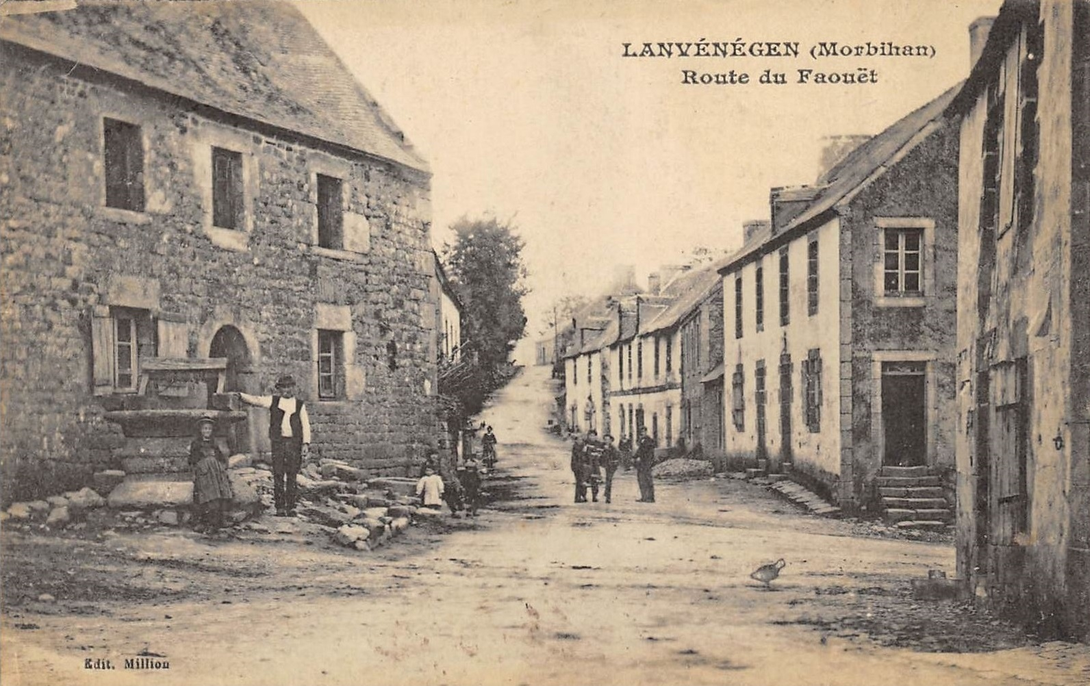 carte postale du début du XXe siècle de la route du Faouët dans le bourg de Lanvénégen.